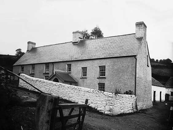 Pantycelyn